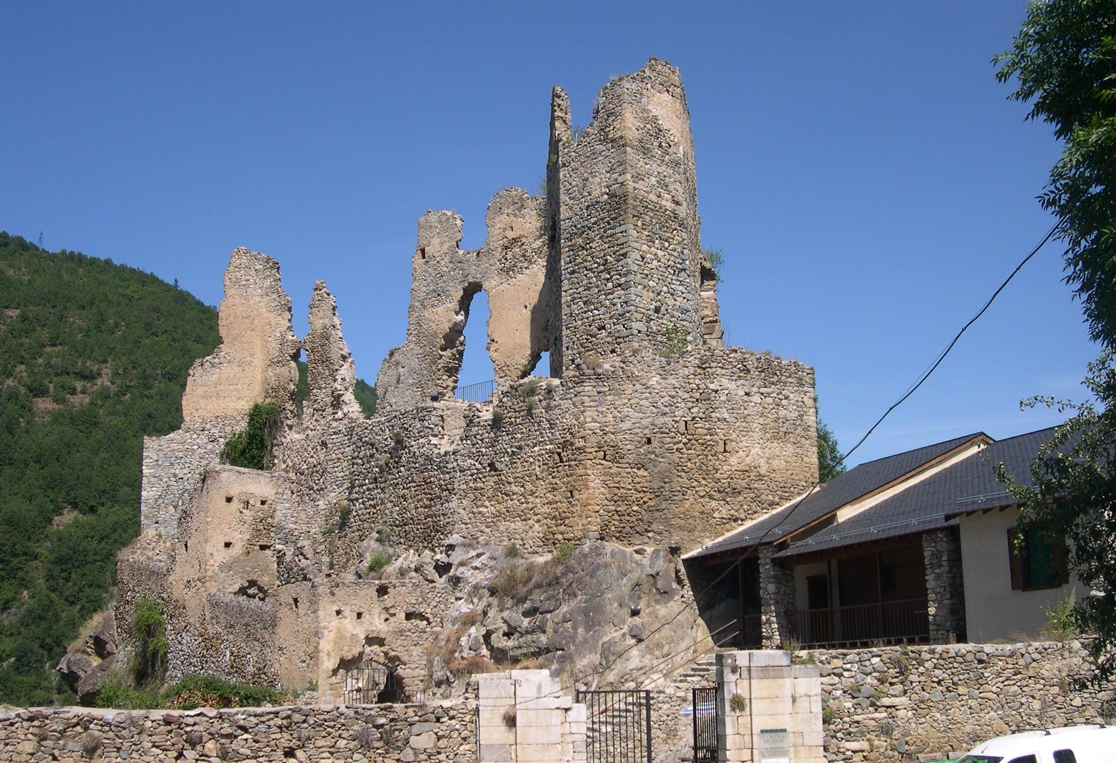 Château d'Usson-les-Bains (Rouze, Ariège, France).